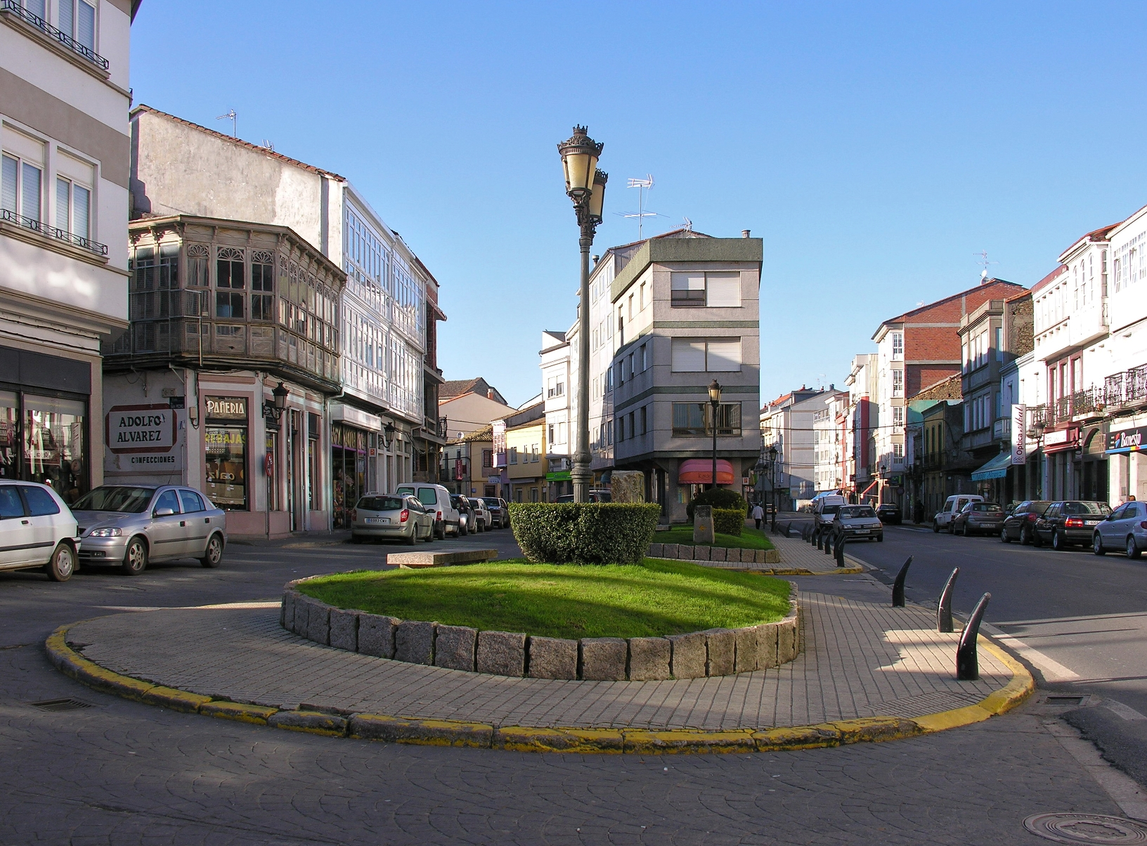 Melide, Galiza.